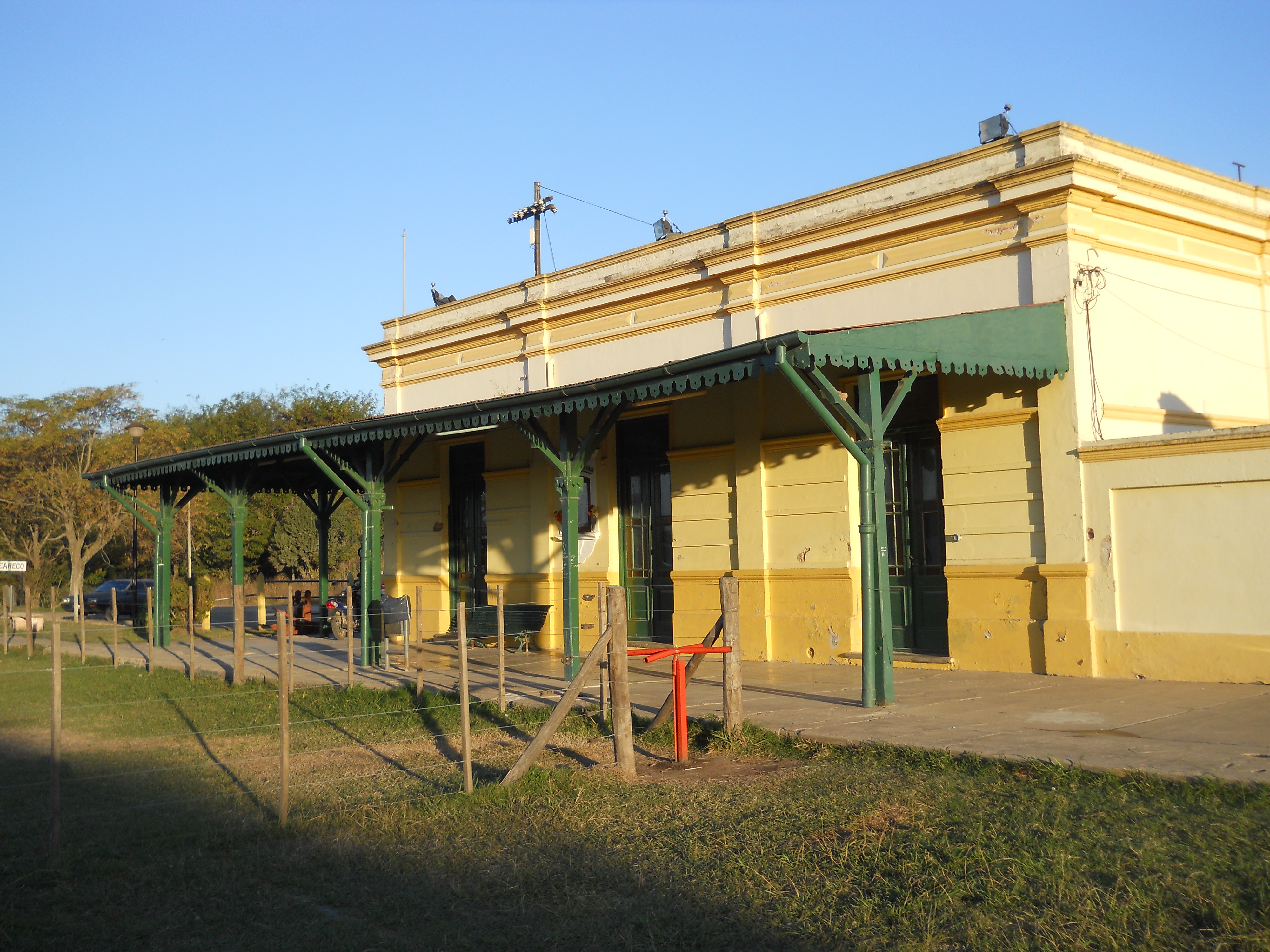 Estación Carmen de Areco, partido de Carmen de Areco, provincia de Buenos Aires, República Argentina